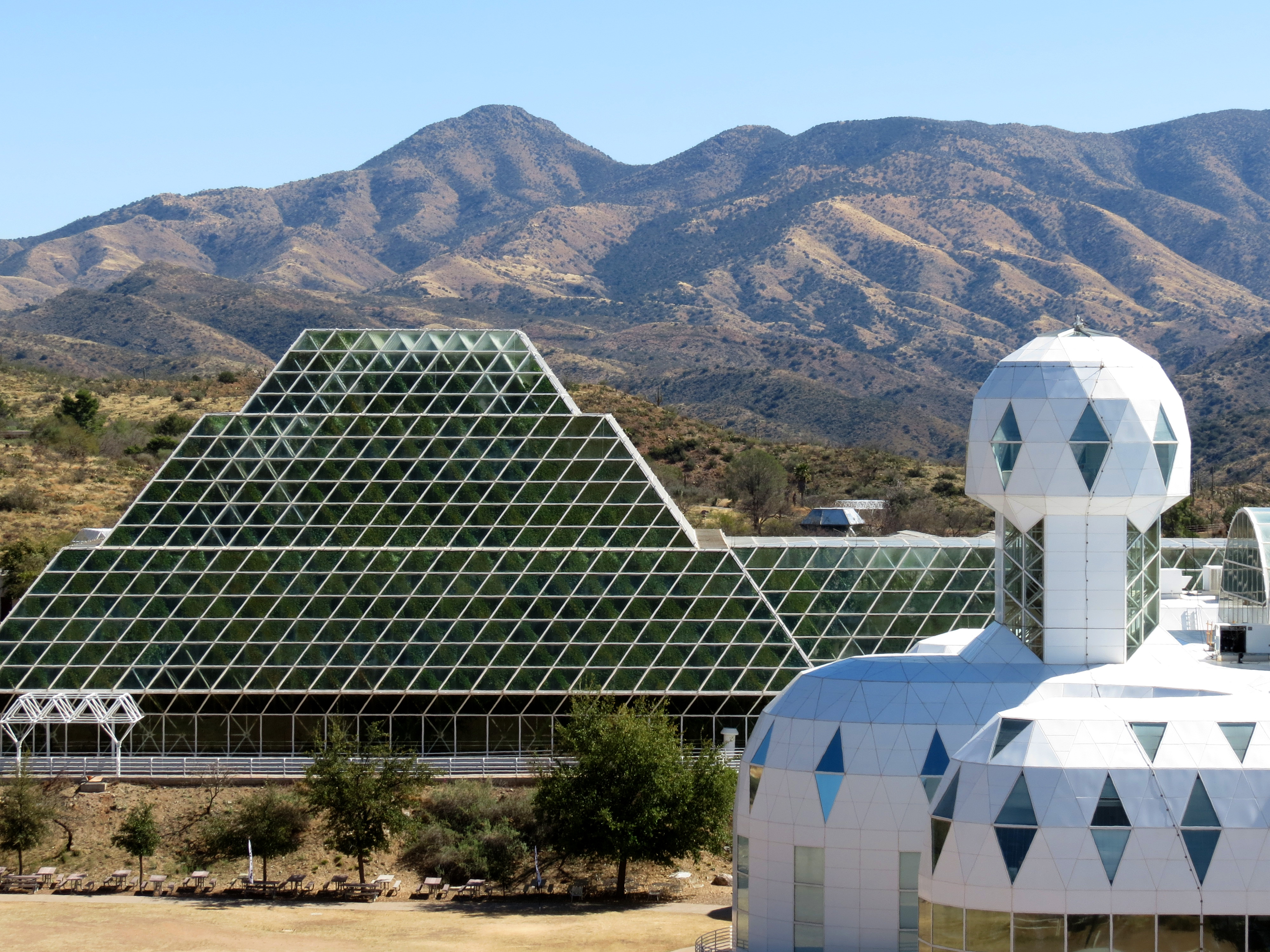 Oracle, Arizona, USA.